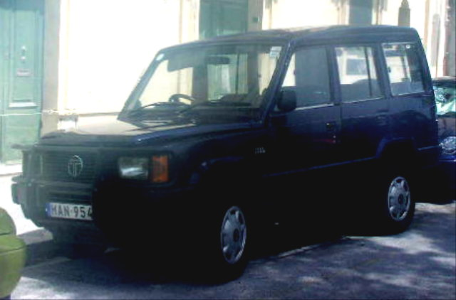 Tata Sumo